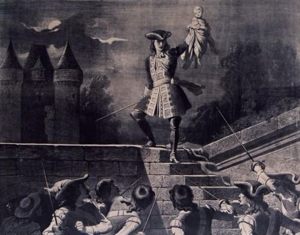 Estampe pour le roman-feuilleton "Le Bossu" de Paul Féval.